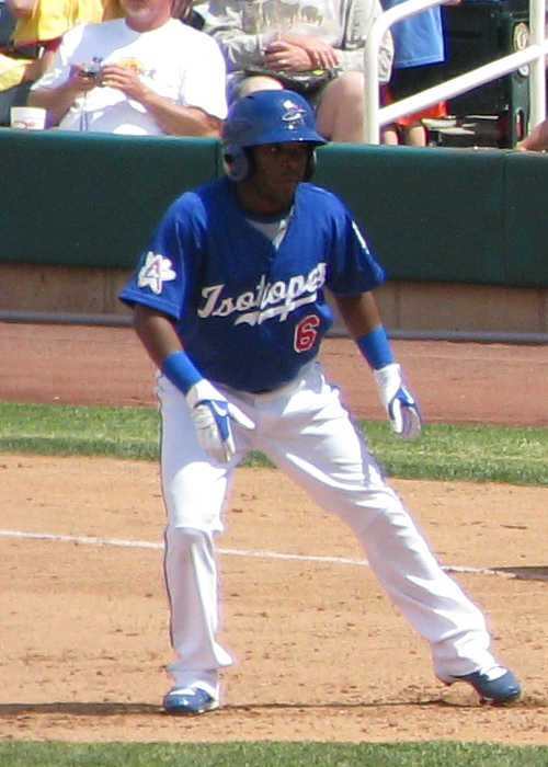 Timo Pérez